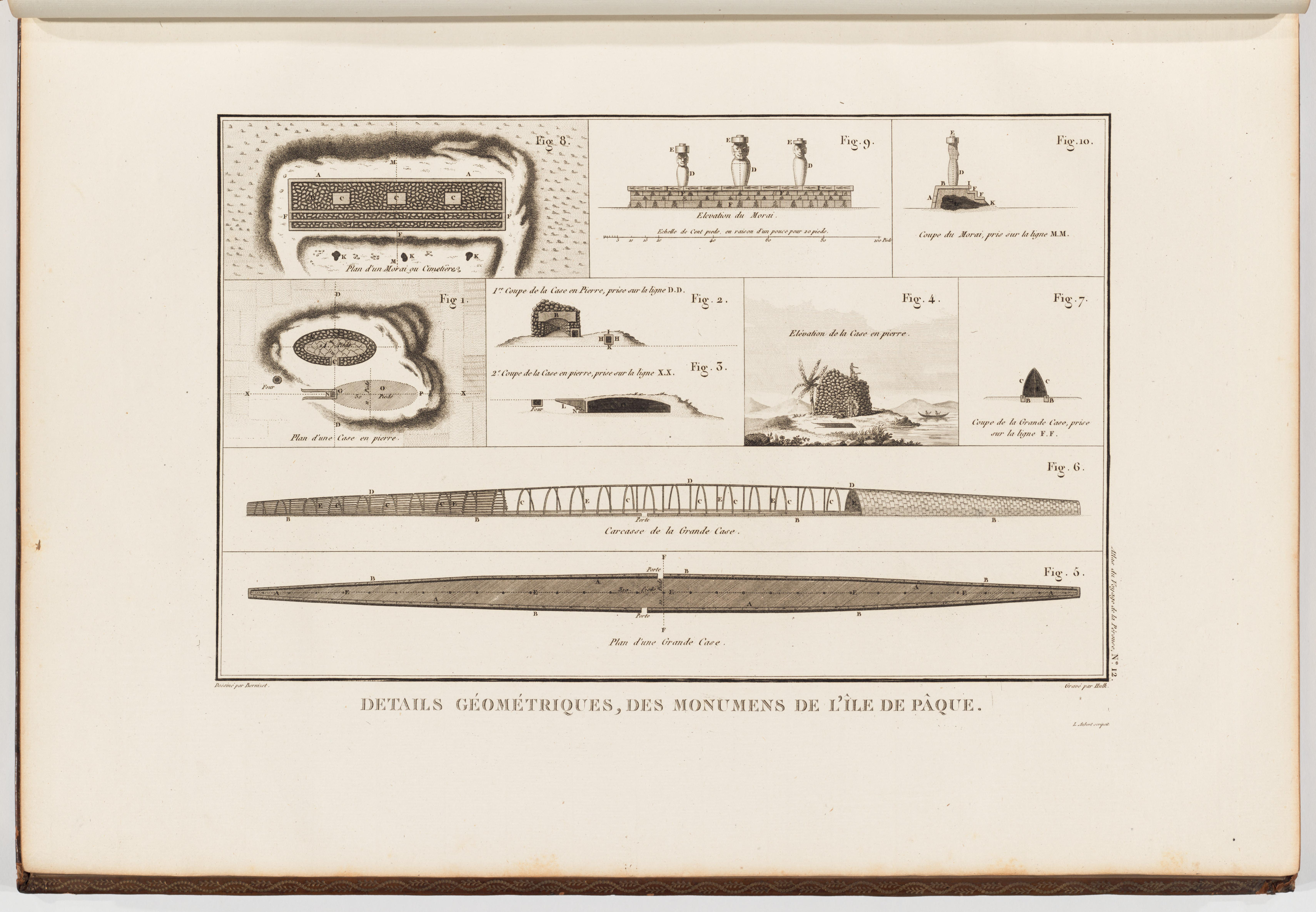 Voyage de La Pérouse autour du monde /publié conformément au décret du 22 avril 1791, et rédigé par L.A. Milet-Mureau.